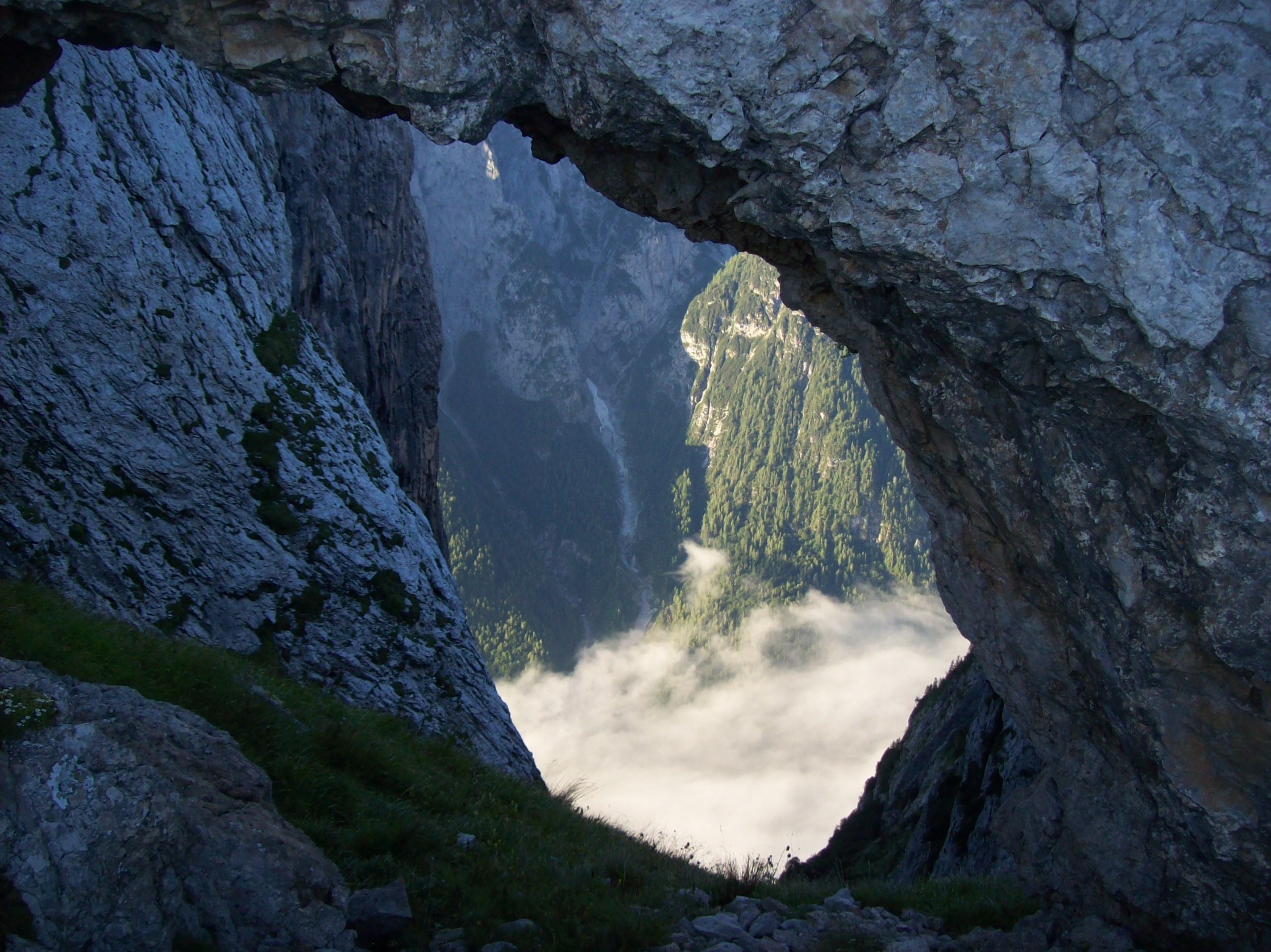 Arcore del bersanel